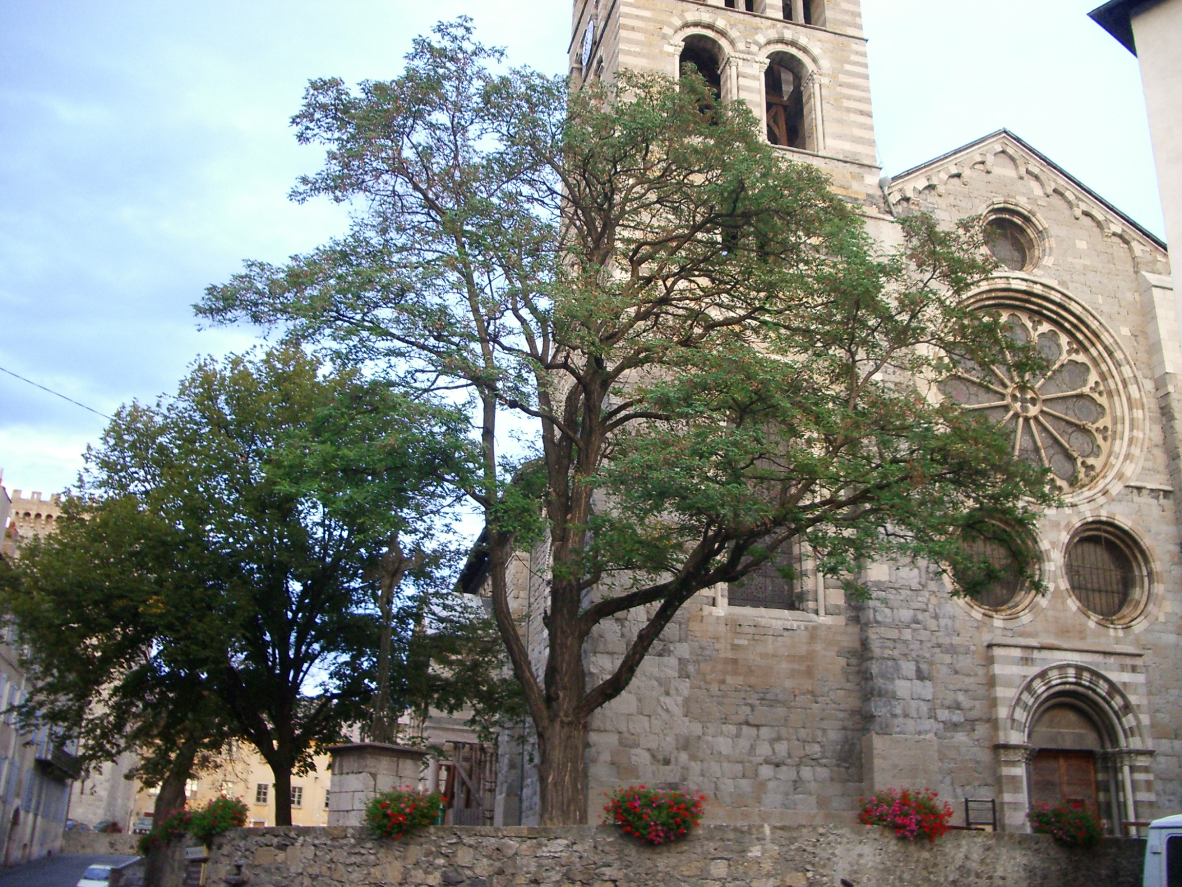 Embrun (Hautes-Alpes, France) : Cathédrale de Notre-Dame du Réal